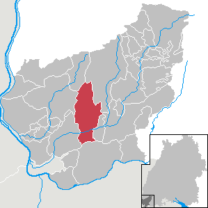 Steinen, Landkreis Lörrach, Baden-Württemberg